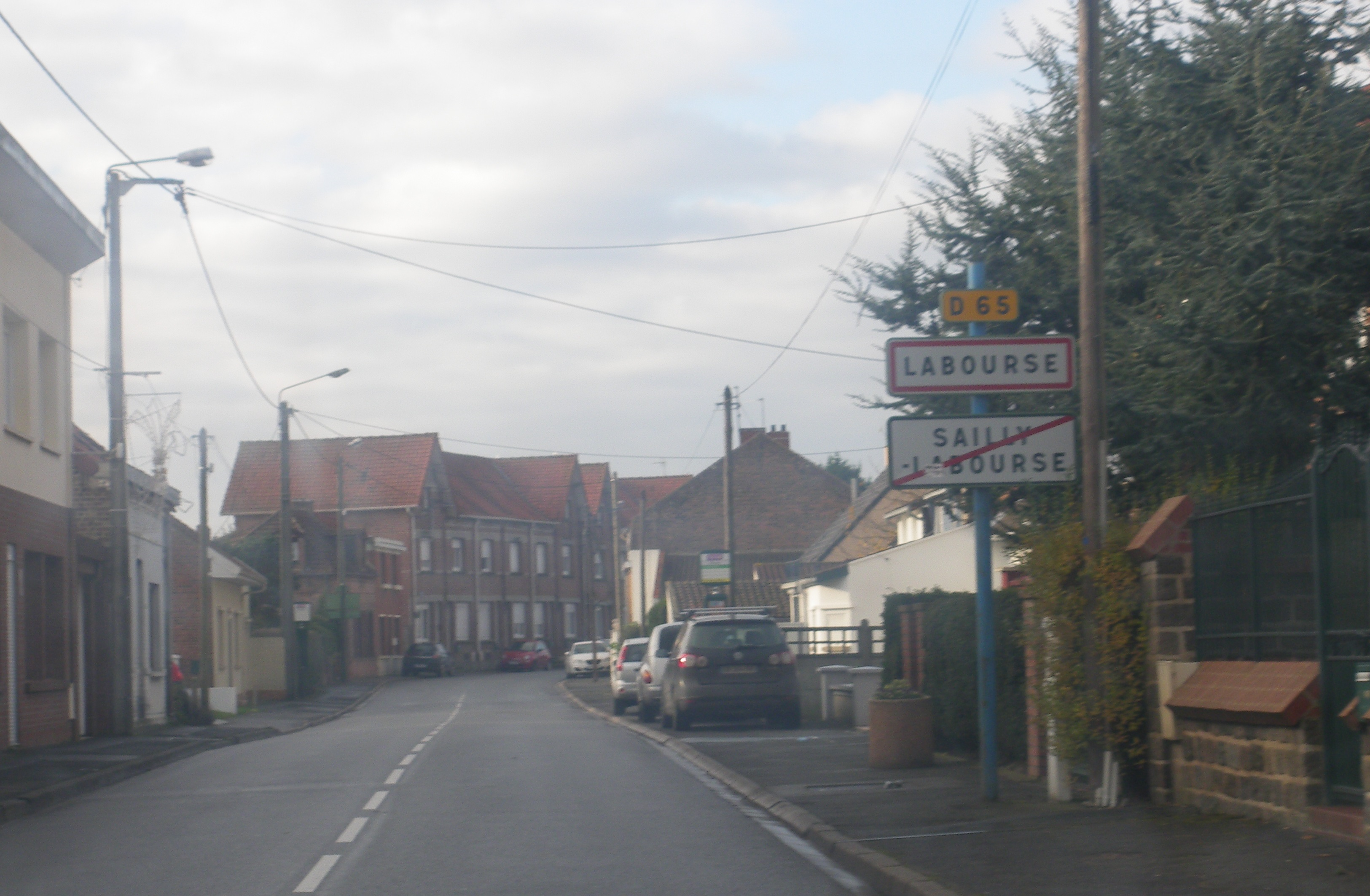 Panneau d'entrée de la commune de Labourse.